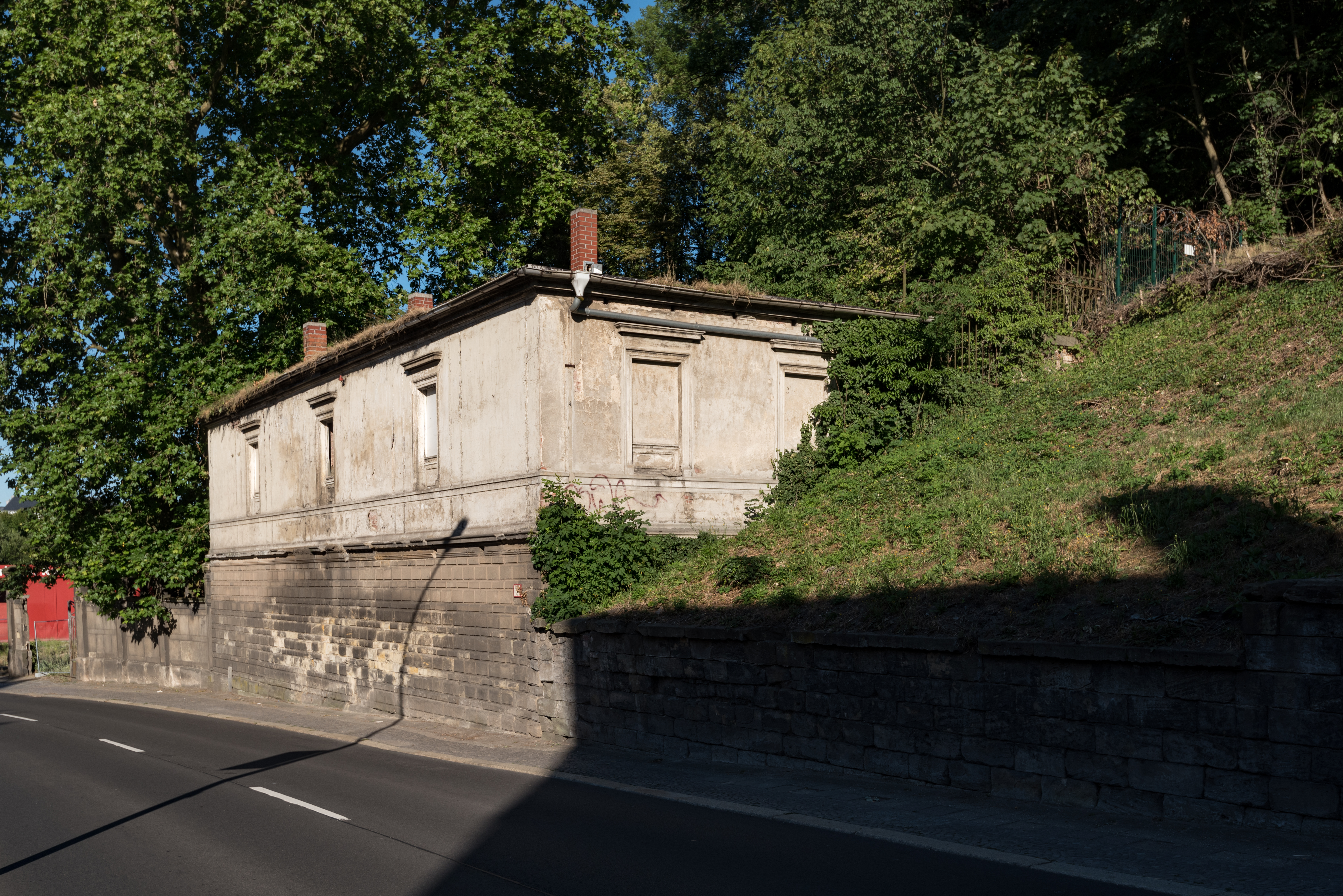 Weißenfels, Naumburger Straße 30